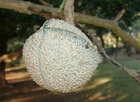 Toad Tree, Krötenbaum, selbst in Südafrika fotografiert und zur Verfügung gestellt--oliver s. 18:56, 12 December 2005 (UTC)